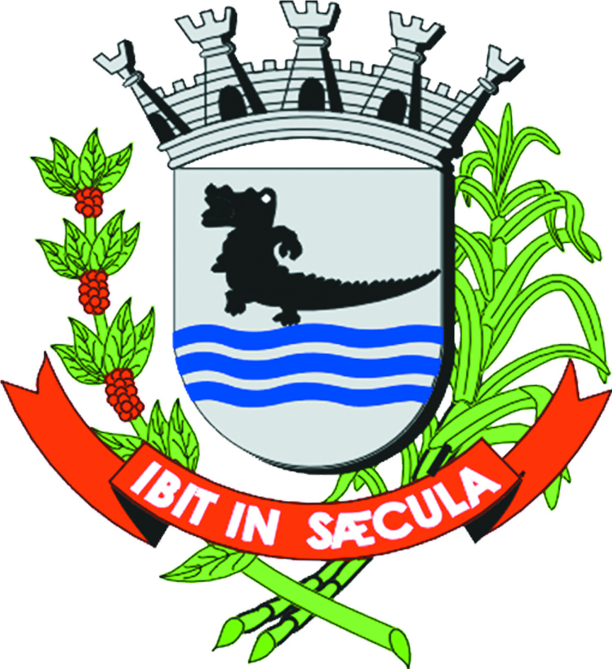 Brasão de Armas do Município de Jacarezinho, disponível no site da prefeitura.